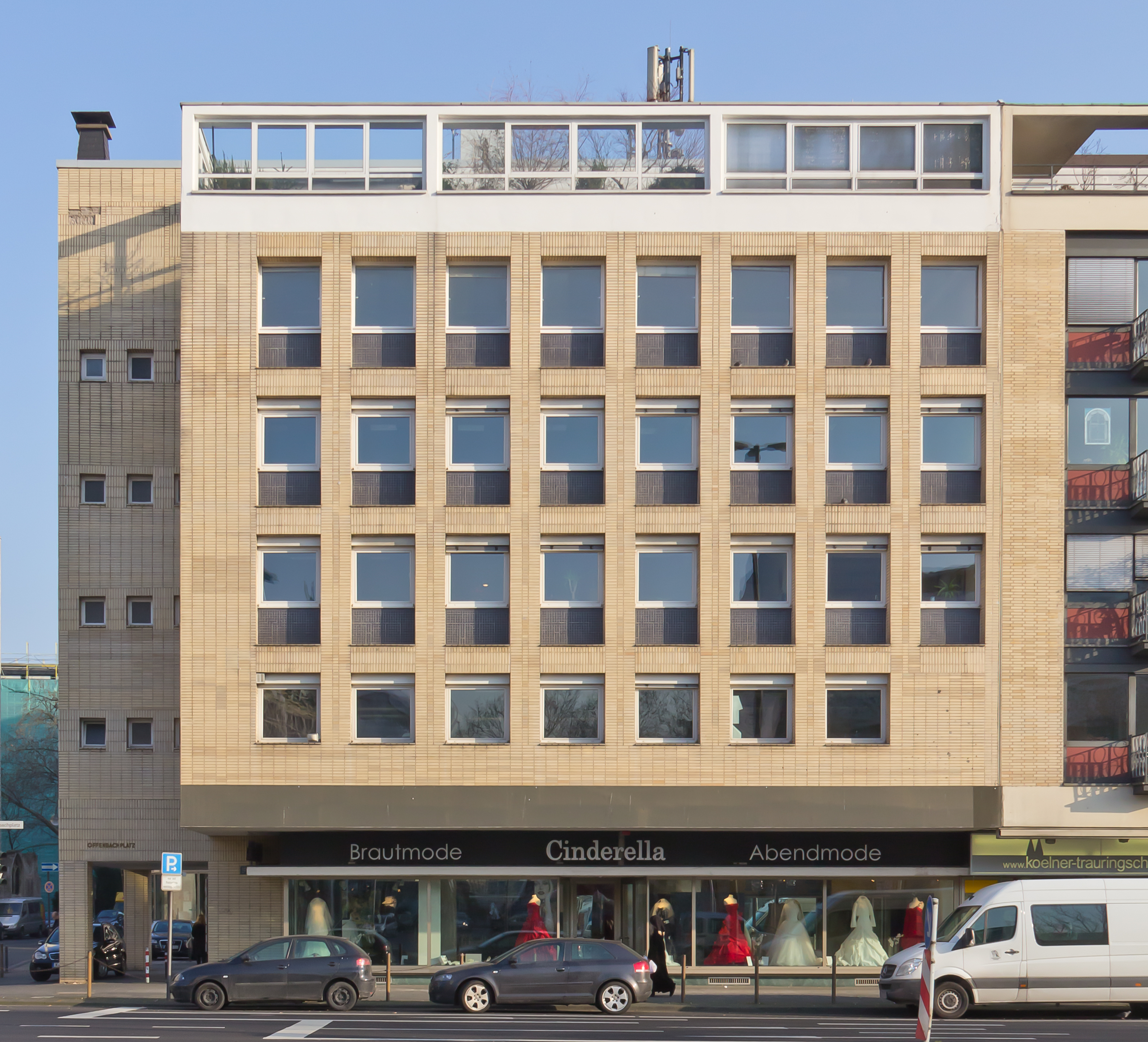 Denkmalgeschützte Büro- und Geschäftshaus. Ansicht vom Offenbachplatz. Architekt: Wilhelm Riphahn, Baujahr: 1960/61